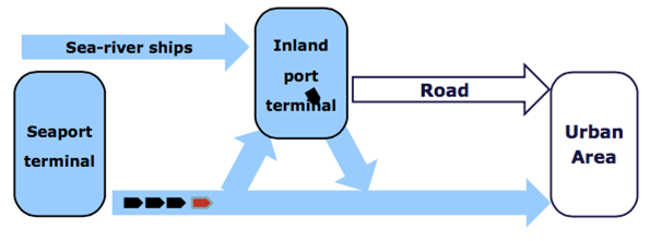 Systemintegration Binnenschifffahrt